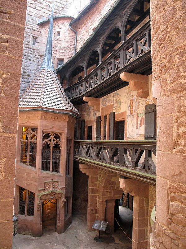 Haut Koenigsbourg